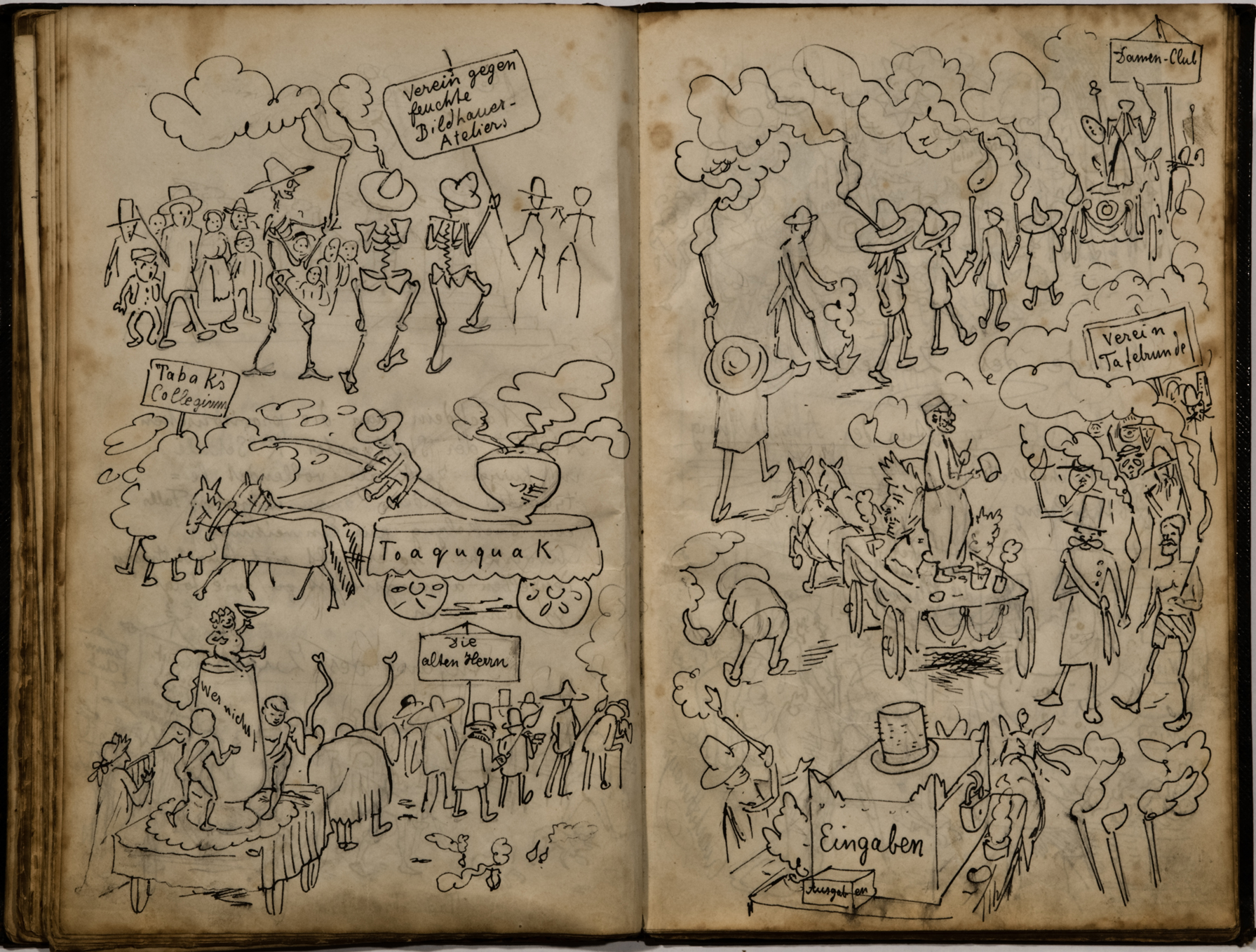 Die "Tafelrunde" des Stuttgarter Künstlerbundes traf sich regelmäßig in Lokalen und verfaßte üppig illustrierte Zeitungen sogenannte Kneipbücher. Begebenheiten, Ausflüge und Anekdoten wurde angedichtet und abgebildet, das Ganze wurde häufig signiert und fast durchgängig aufbewahrt. Diese kleinen Kostbarkeiten in Form von fünf Büchern sind ein interessantes Abbild der damaligen Zeit und dokumentieren auch die Kunstfertigkeit der verschiedenen Mitglieder. Aufgrund der Signaturen oder "literarischen Erwähnungen" lassen sich auch Lebensläufe verfolgen. Hier abgebildet ein Doppelseite.